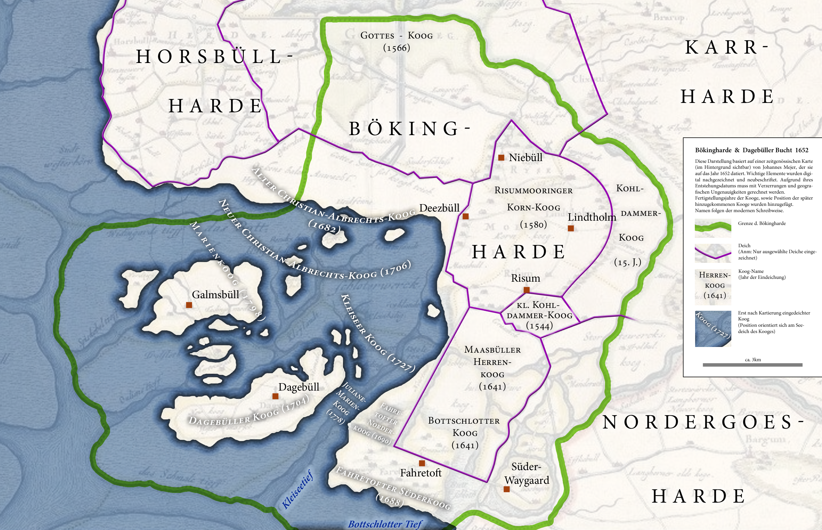 Diese Darstellung basiert auf einer zeitgenössischen Karte (im Hintergrund sichtbar) von Johannes Mejer († 1674): "Landcarte der, zu dem AMBTE TONDERN gehörigen Marschländer. Anno 1652", die aufgrund des Todes Mejer's vor mehr als 300 Jahren gemeinfrei ist. Für eine ähnliche Karte auf Commons: ). Wichtige Elemente wurden digital nachgezeichnet und neubeschriftet. Aufgrund ihres Entstehungsdatums muss mit Verzerrungen und geografischen Ungenauigkeiten gerechnet werden. Fertigstellungsjahre der Köge, sowie Position der später hinzugekommenen Köge wurden hinzugefügt. Namen folgen der modernen Schreibweise.